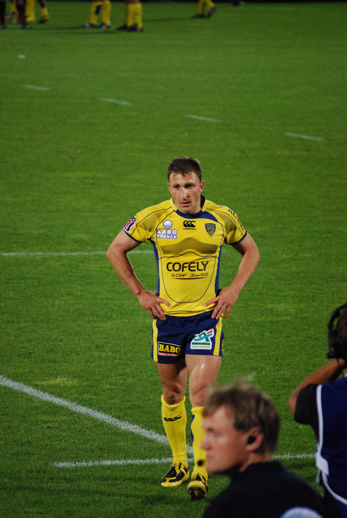 Pierre Mignoni lors de la demi-finale du top 14 2008-2009 opposant l'ASM Clermont Auvergne au Stade toulousain